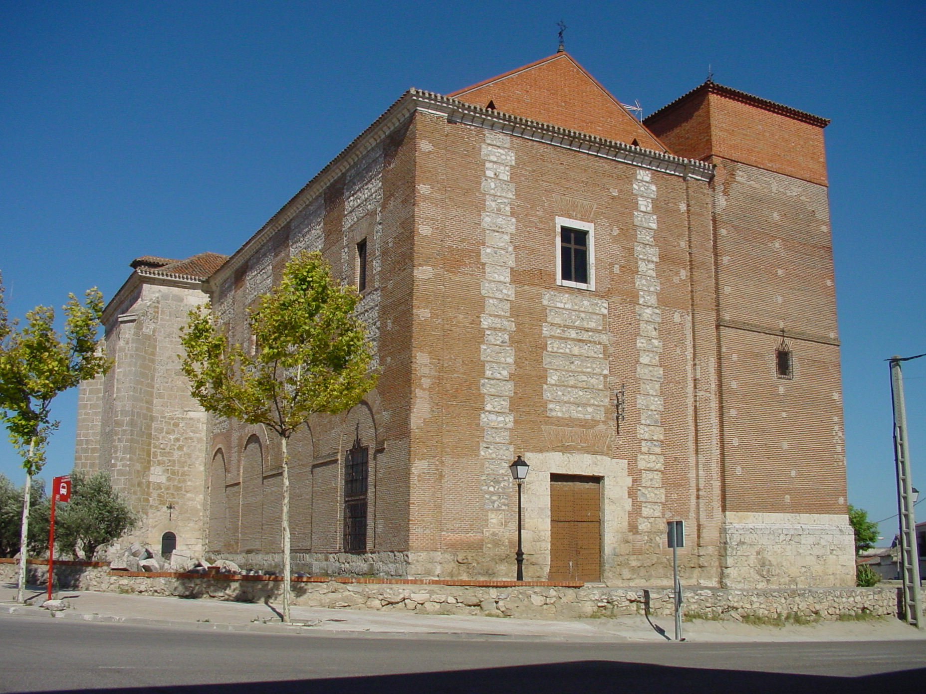 Iglesia en Torrejón de Velasco.